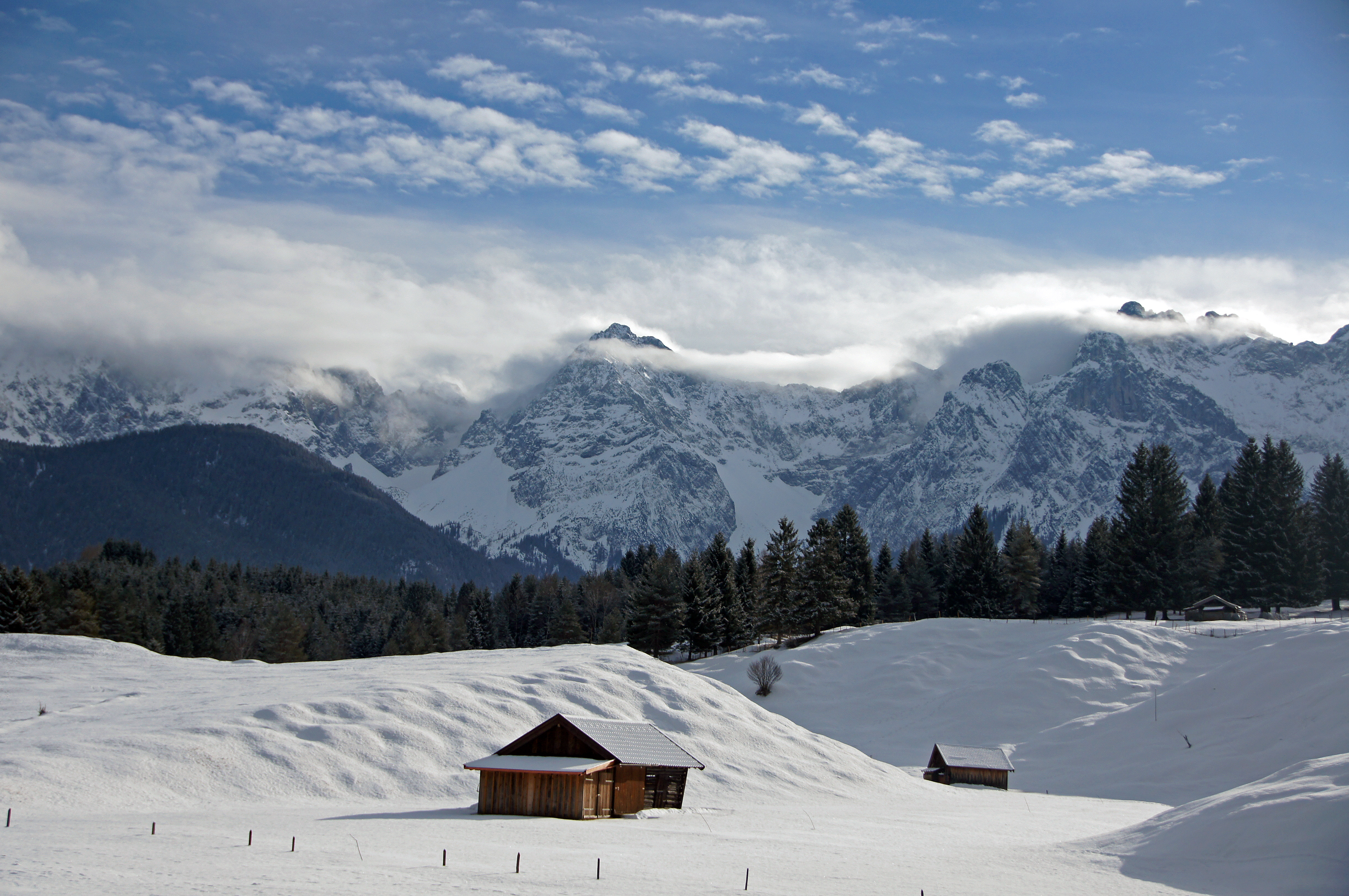 Das Karwendelgebirge